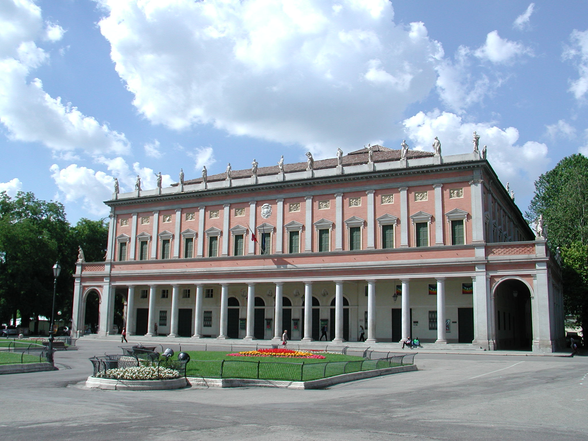 teatro municipale, Reggio Emilia